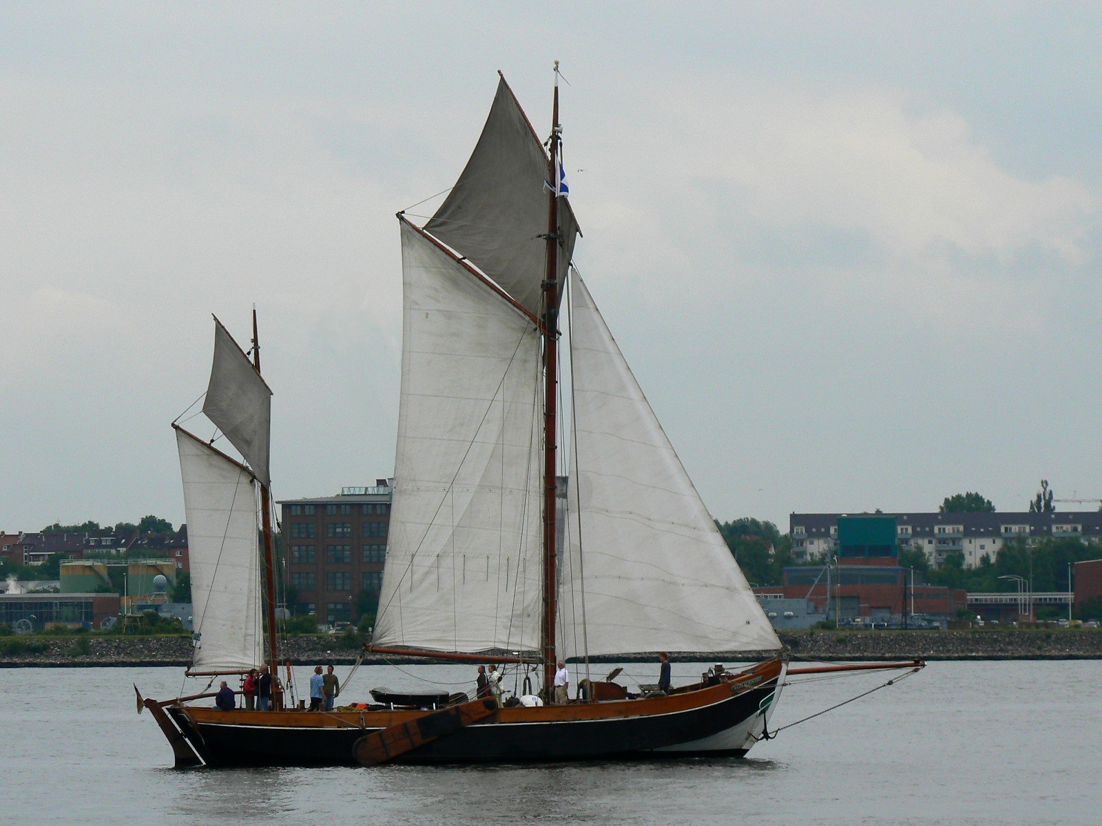 Segelschiff (Besanewer) Maria af von Hoff auf der Kieler Förde. Nachbau des Fischereiewers Maria HF 31 von 1880 (1978-1982 erstellt).